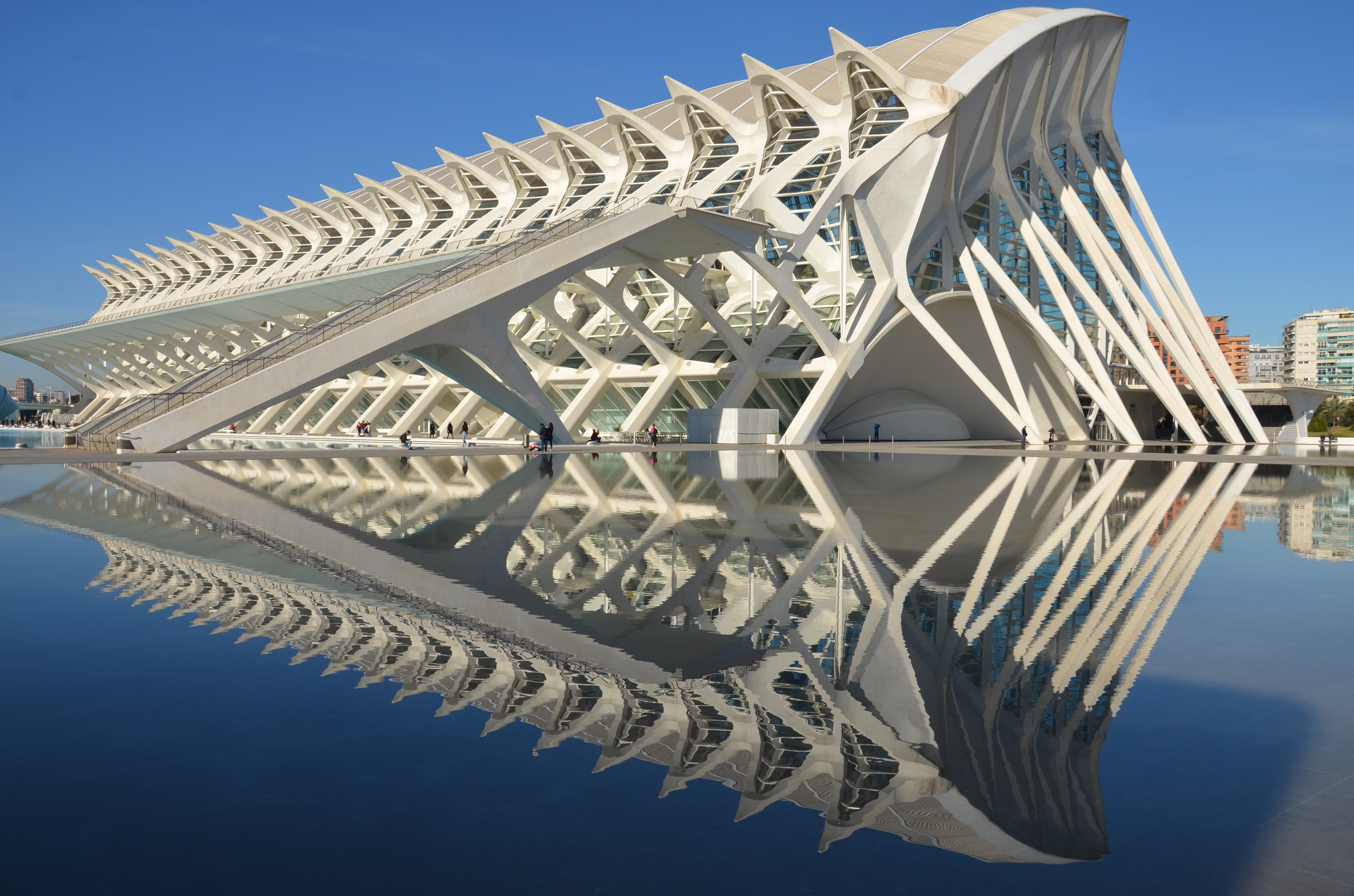 Het Museo de las Ciencias Príncipe Felipe in Valencia.